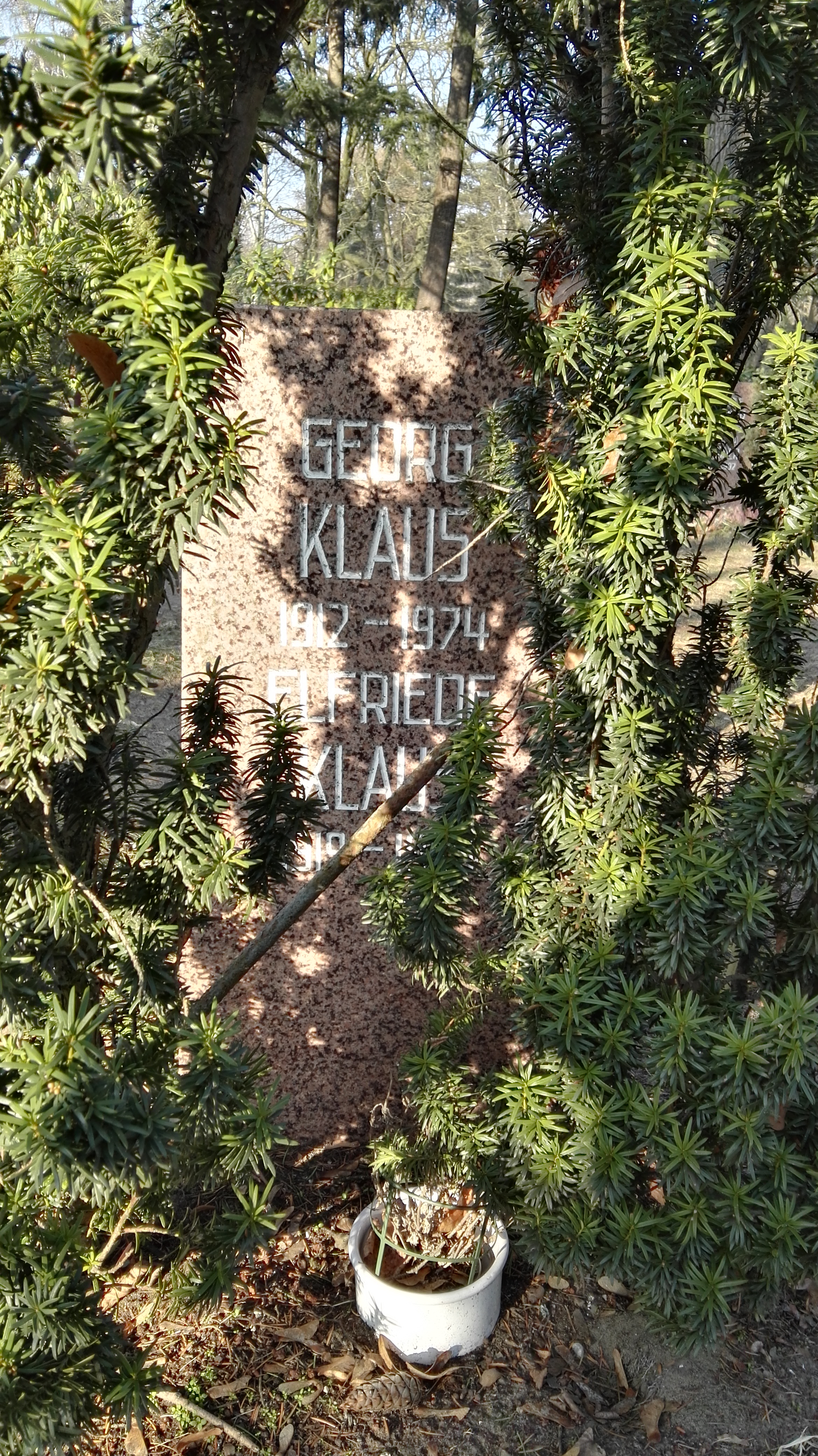 Grab von Georg Klaus und Elfriede Klaus in der Grabanlage Pergolenweg auf dem Sozialistenfriedhof des Zentralfriedhofs Friedrichsfelde